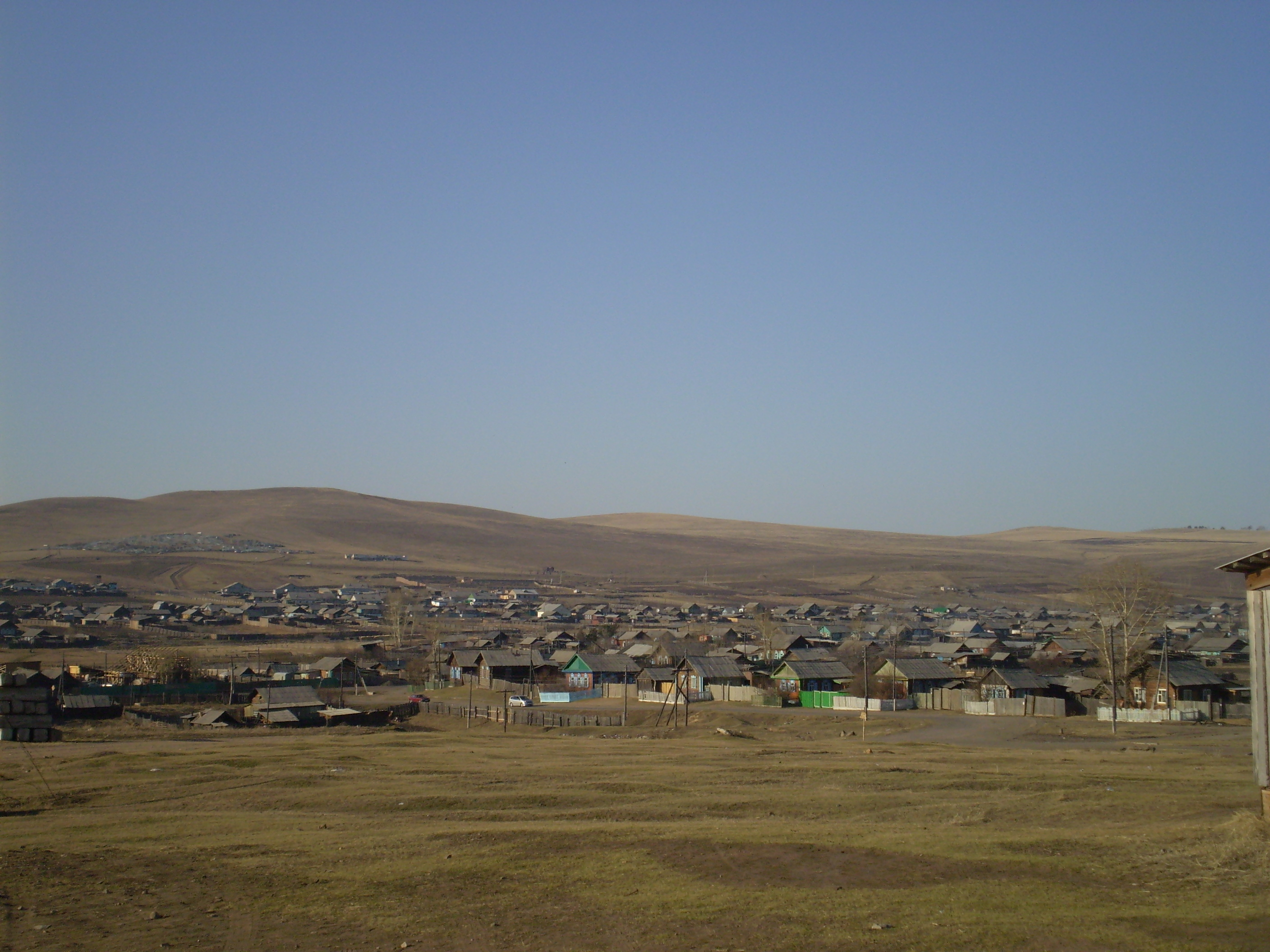 Село Мухоршибирь